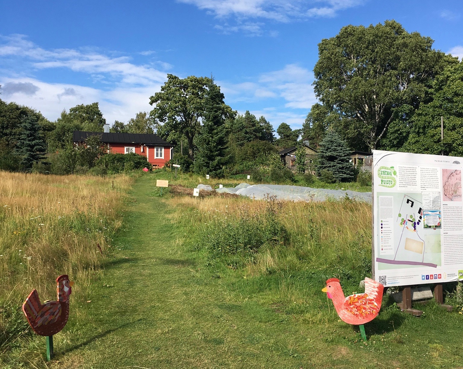 Syötävä Puisto, Helsinki, Mustikkamaa, elokuu 2017